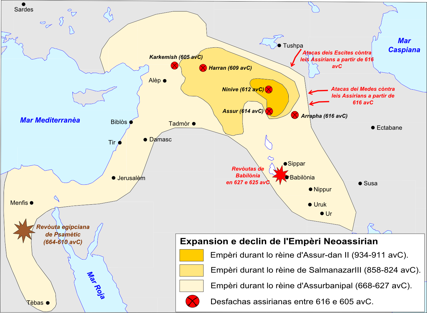 Expansion e declin de l'Empèri Neoassirian.